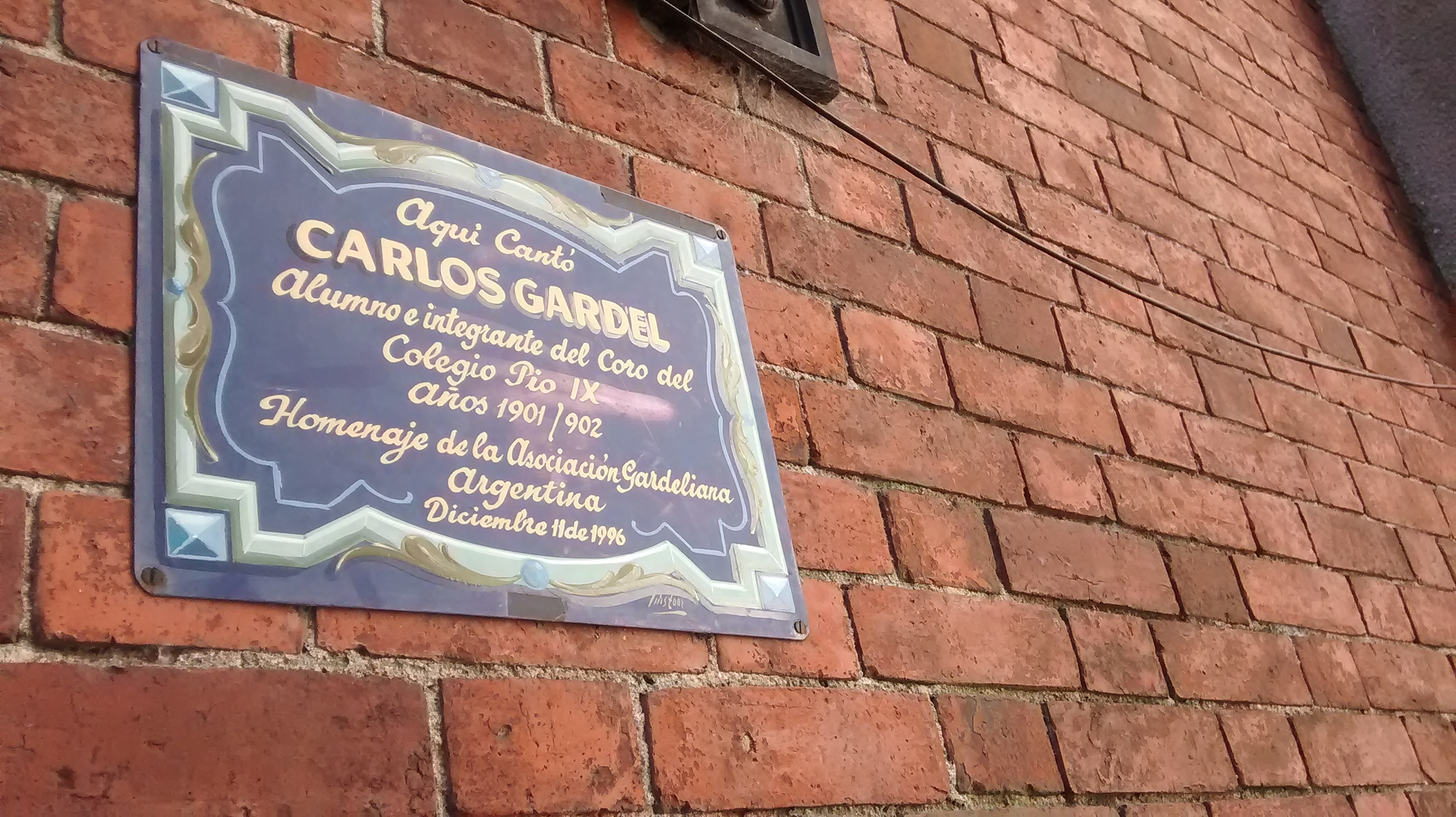 Placa de Gardel en la "Basílica de Maria Auxiliadora y San Carlos" de Palermo, donde él cantó con el coro del colegio Pio IX alrededor de 1901.